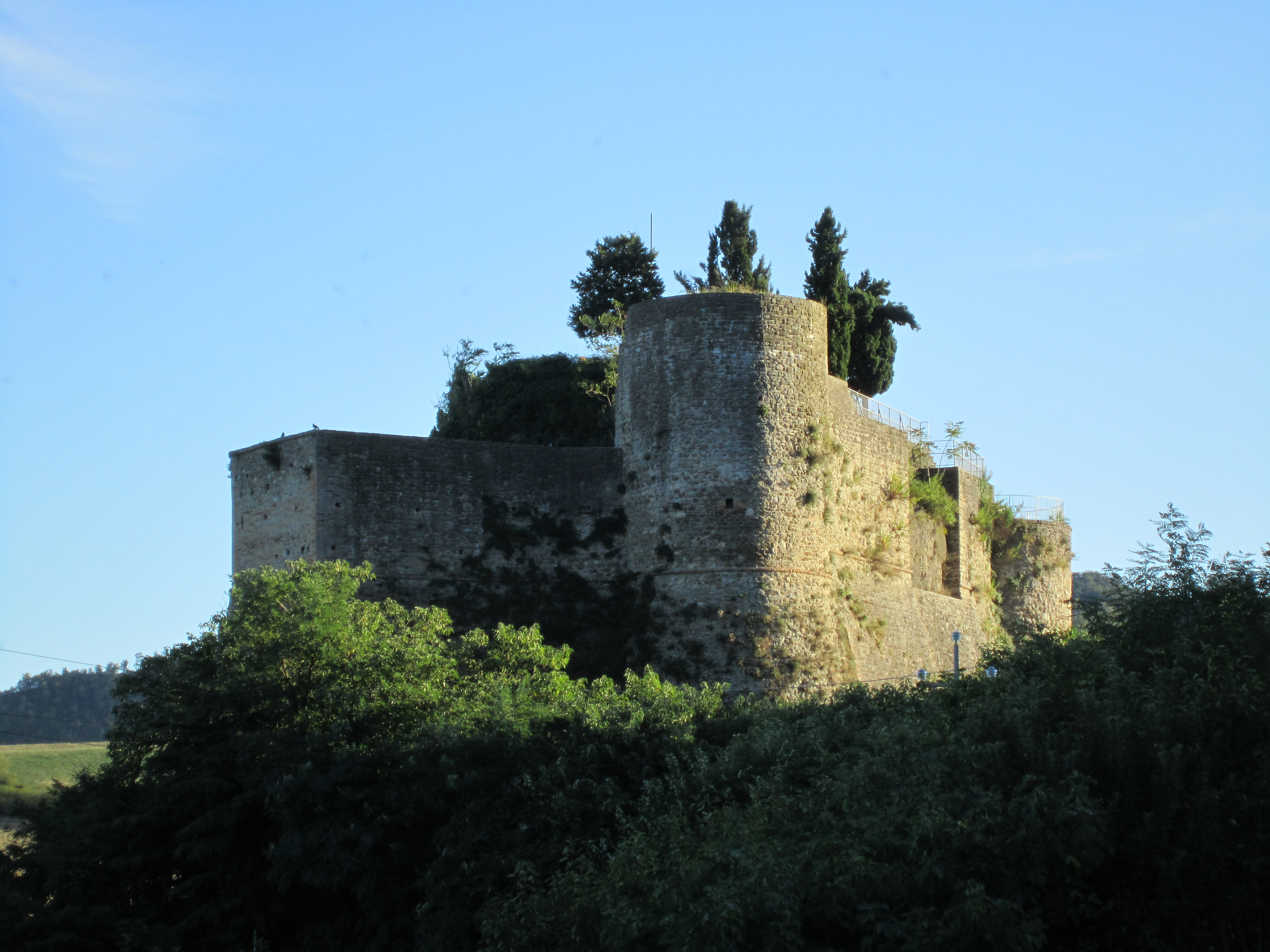 Rocca di Predappio Alta, foto propria